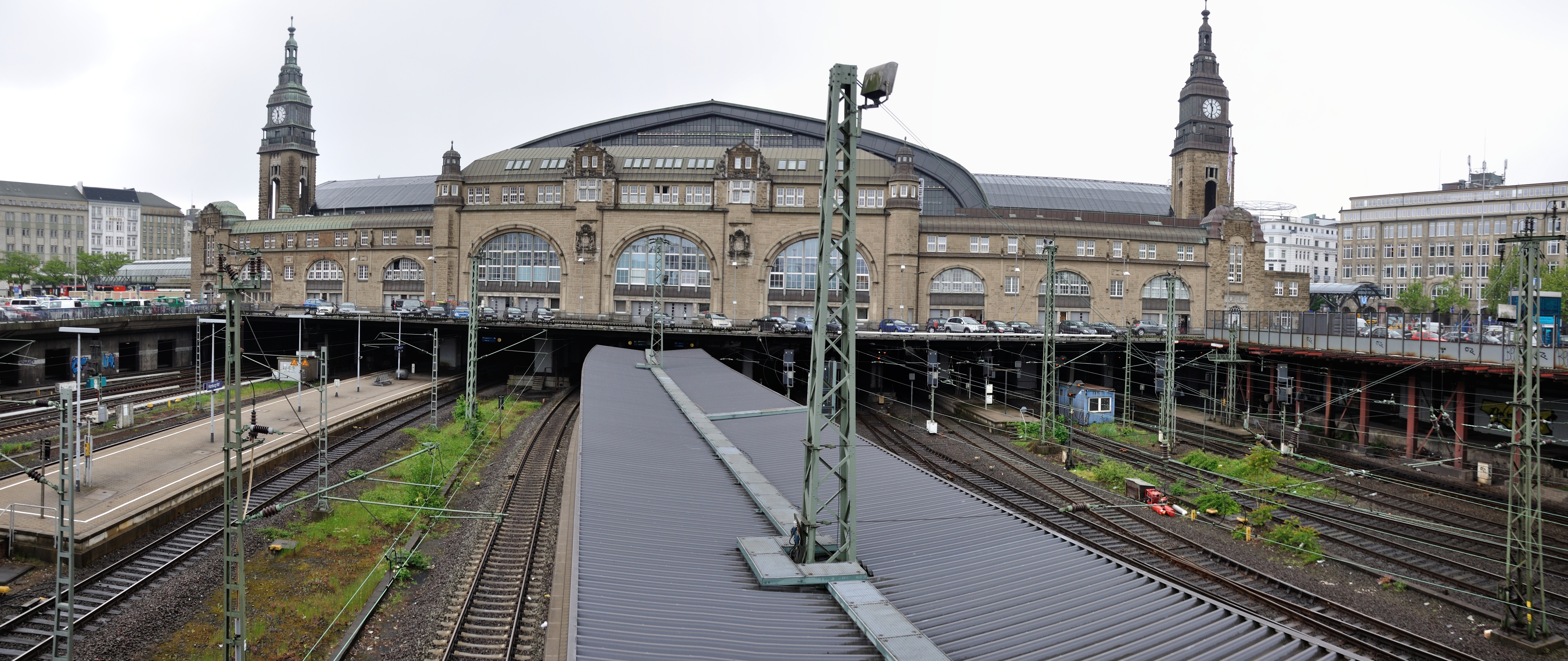 Germany, Hamburg, Hamburg main station